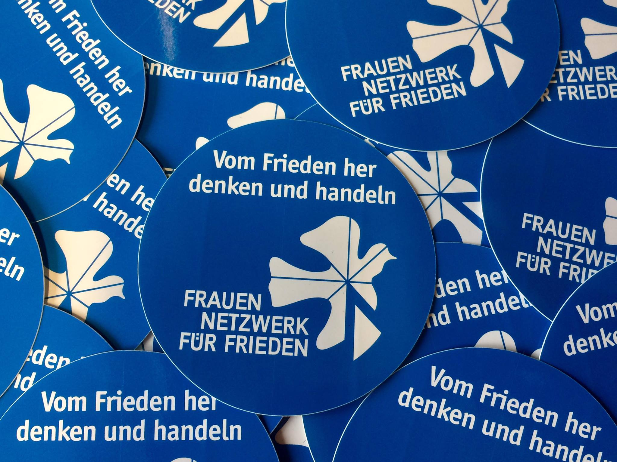 Auf dem Foto zu sehen sind übereinandergelegte und einander teilweise überdeckende Aufkleber des Frauennetzwerk für Frieden e.V., hergestellt anlässlich des Abendymposiums "Vom Frieden her denken und handeln - Alternativen zur Sicherheitslogik und Gewaltkultur", das am 17.11.2017 in Bonn stattgefunden hat. Auf jedem Aufkleber ist das Logo des FNF mit dem Schriftzug "Vom Frieden her denken und handeln" zu sehen.